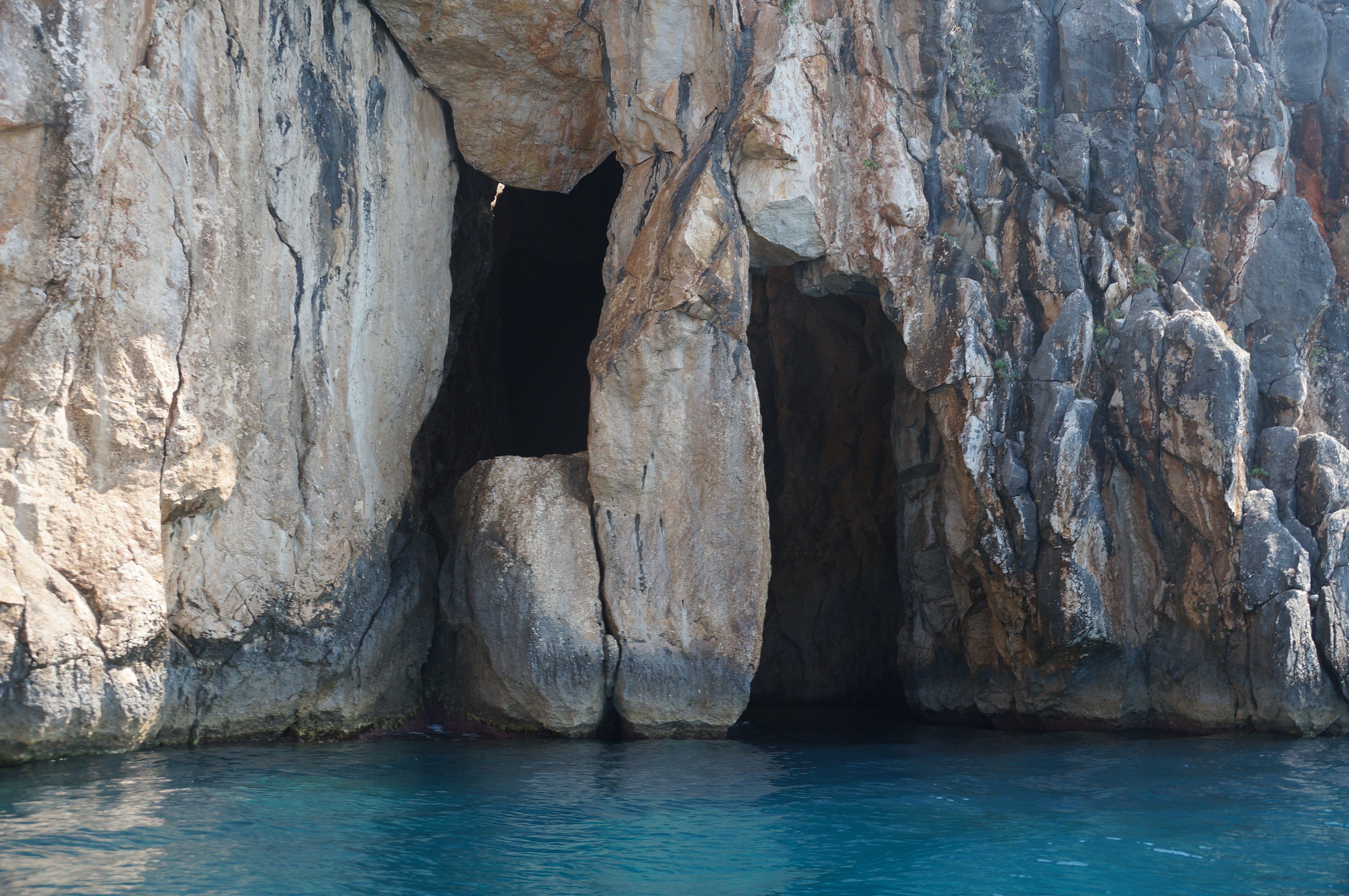 Shpella e piratëve, Dhërmi